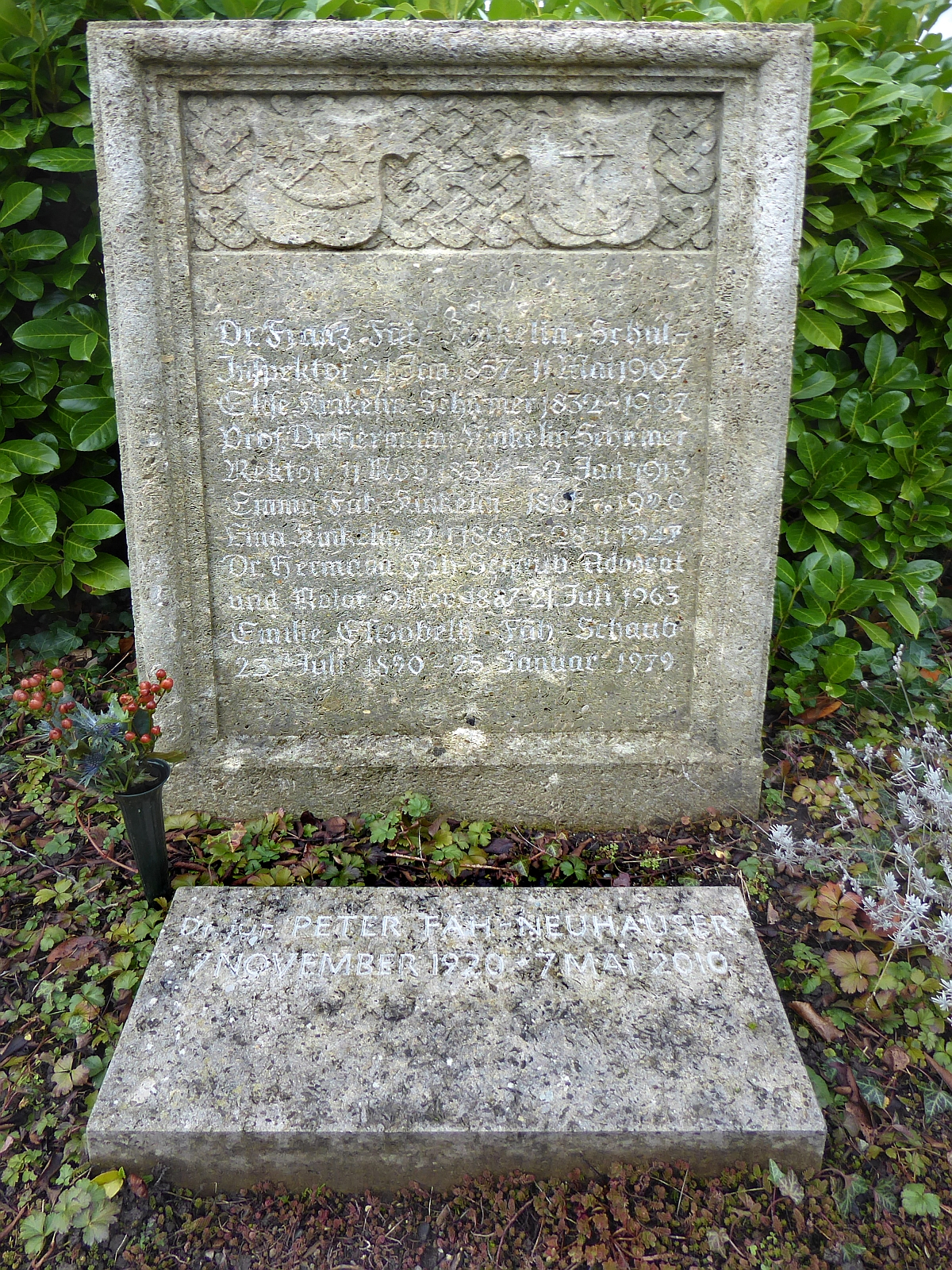 Hermann Kinkelin-Schirmer (1832–1913) Dr., Prof. a.o. für Mathematik an der Univ. Basel, Rektor, Politiker, Versicherungsexperte, Statistiker, Gründer der die Schweiz. Statist. Gesellschaft und der Statist.-Volkswirtschaft. Gesellschaft in Basel, Familiengrab auf dem Friedhof Hörnli, Riehen, Basel-Stadt